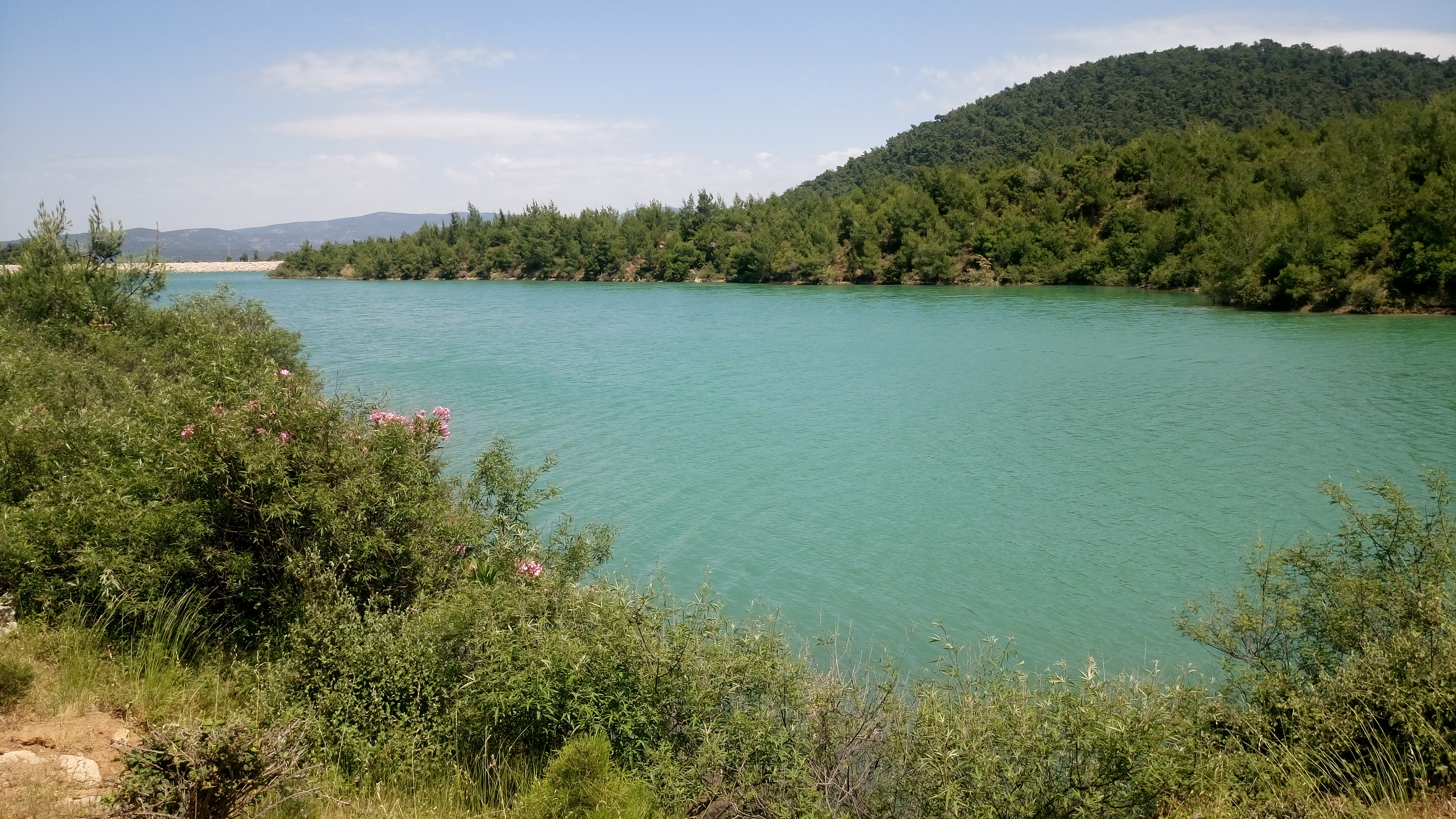 İzmir, Menderes'teki Ataköy Göleti ve çevresi